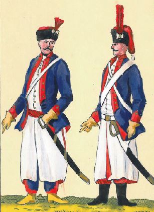 50. Towarzysz i szeregowy Brygada Husarii Koronnej (Towarzysz i szeregowy 1 Brygady KN "Husarskiej"